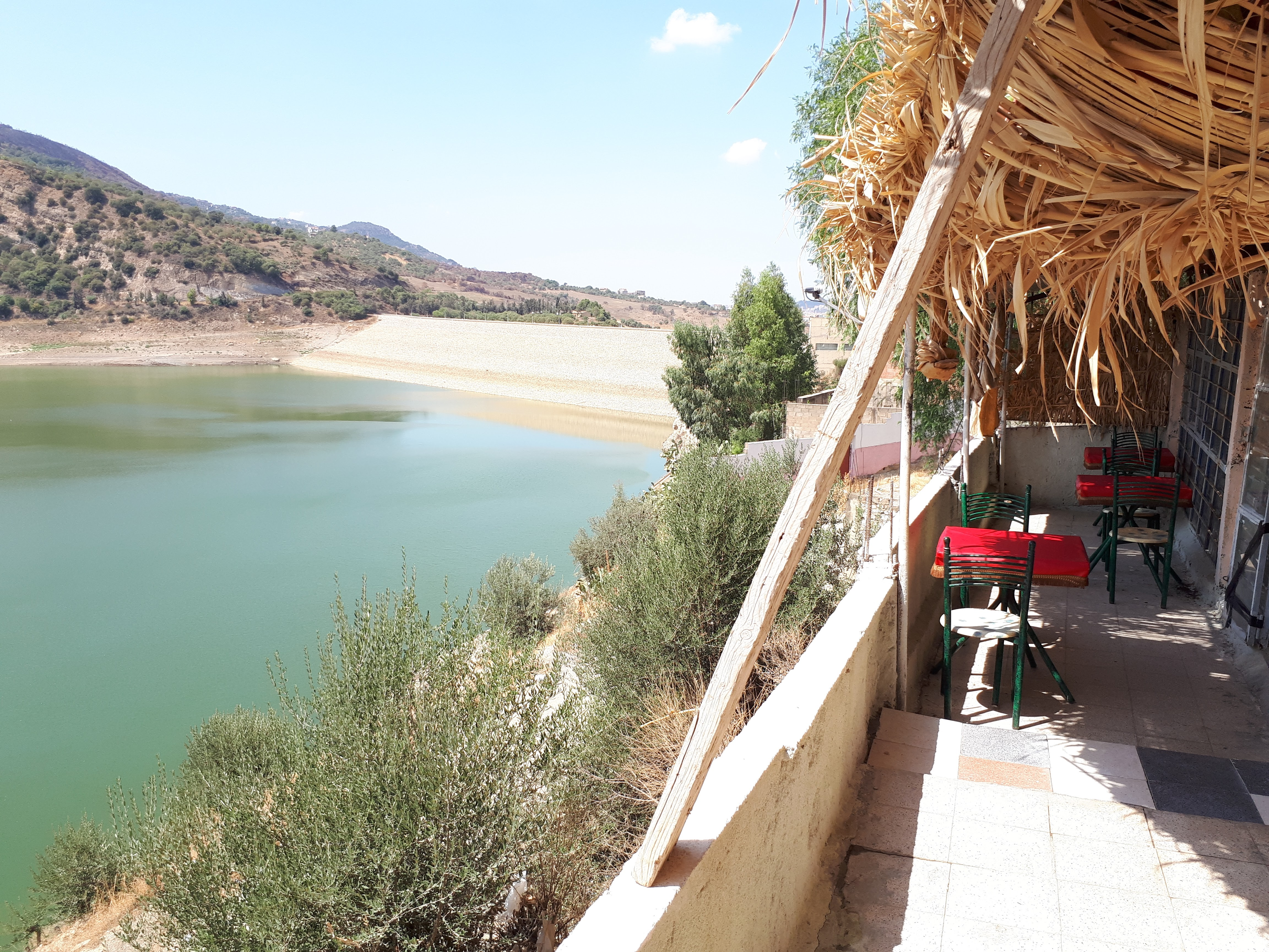 Un photo du barrage de takssabte tizi ouzou This is an image of "African people at work" from Algeria